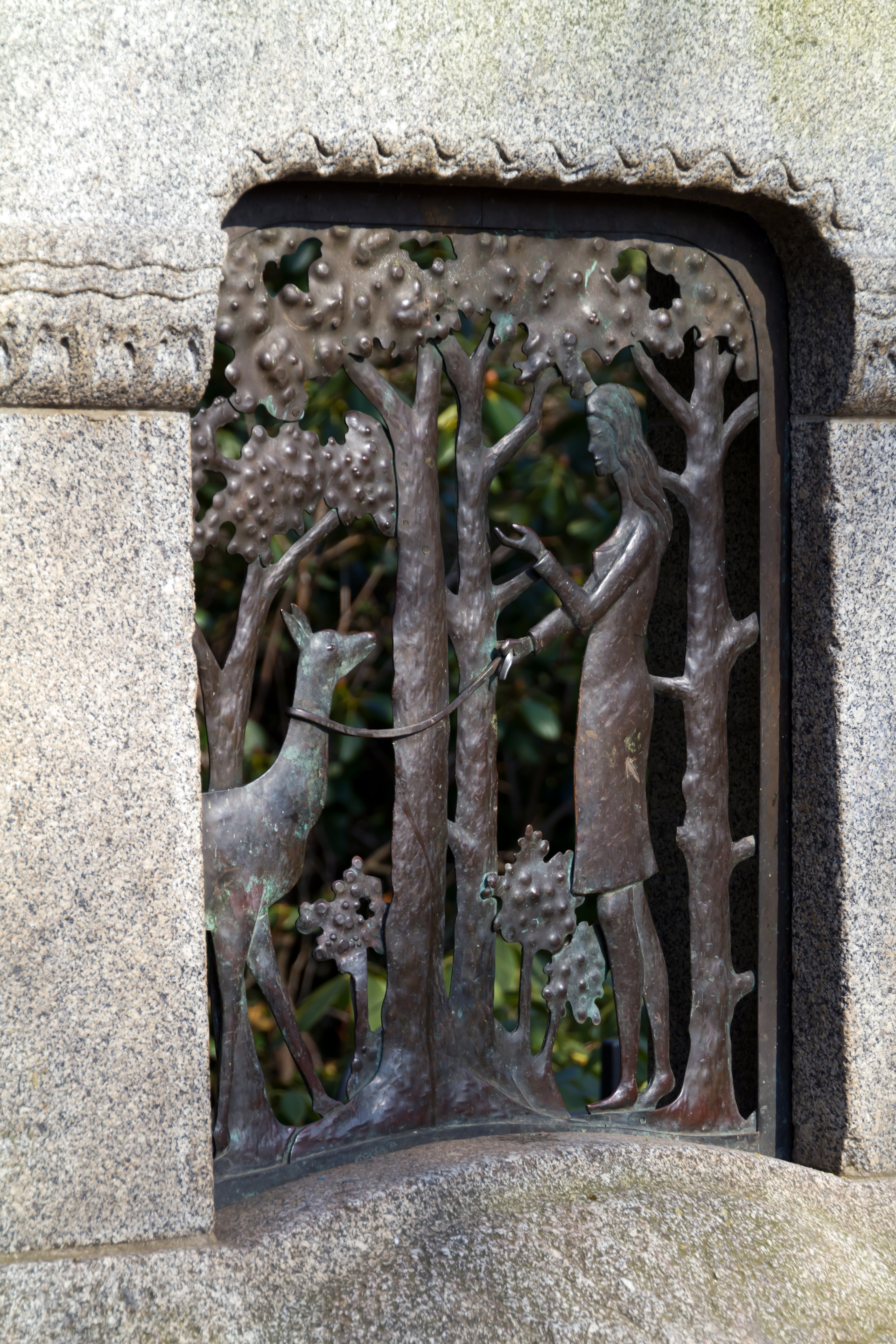 Märchenbrunnen im Hermann-Seidel-Park (Detail)